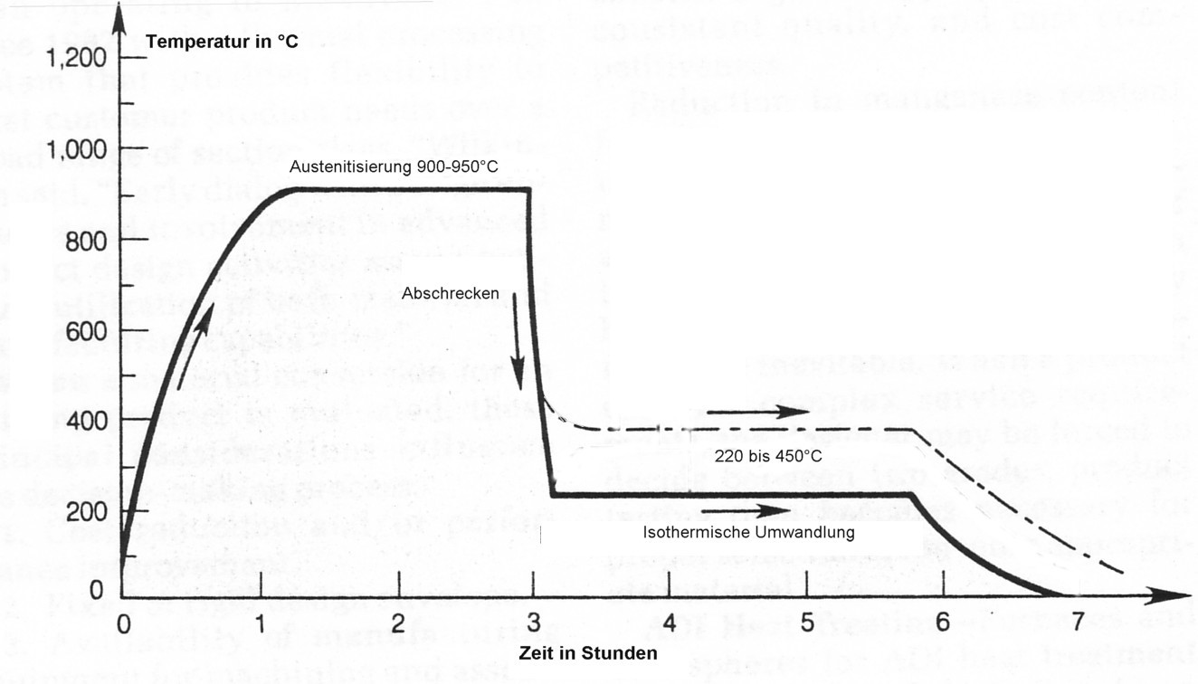 Bainitisches Gusseisen mit Kugelgraphit: Wärmebehandlung